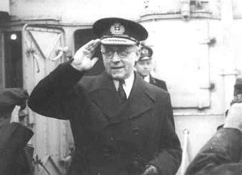 Vadm Jan Willem Termijtelen (1893-1977), bij een bezoek aan patrouillevaartuig Hr.Ms. Queen Wilhelmina (1942-1965). Vadm Termijtele was o.a. chef marinestaf 1941-1947 en cdt der marine in Groot-Brittannië 1941-1945; in 1947 uit dienst